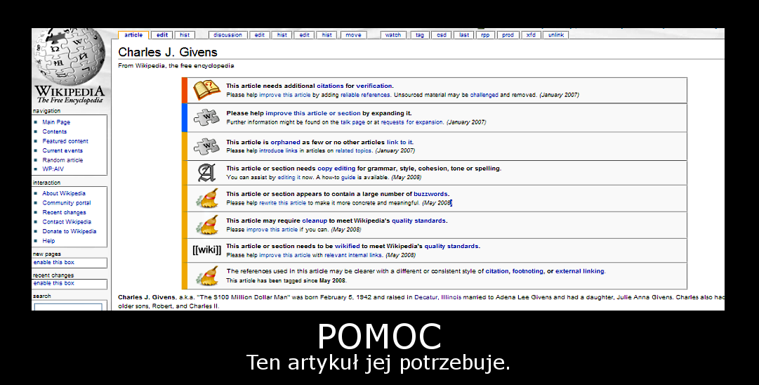 Przetłumaczony demot